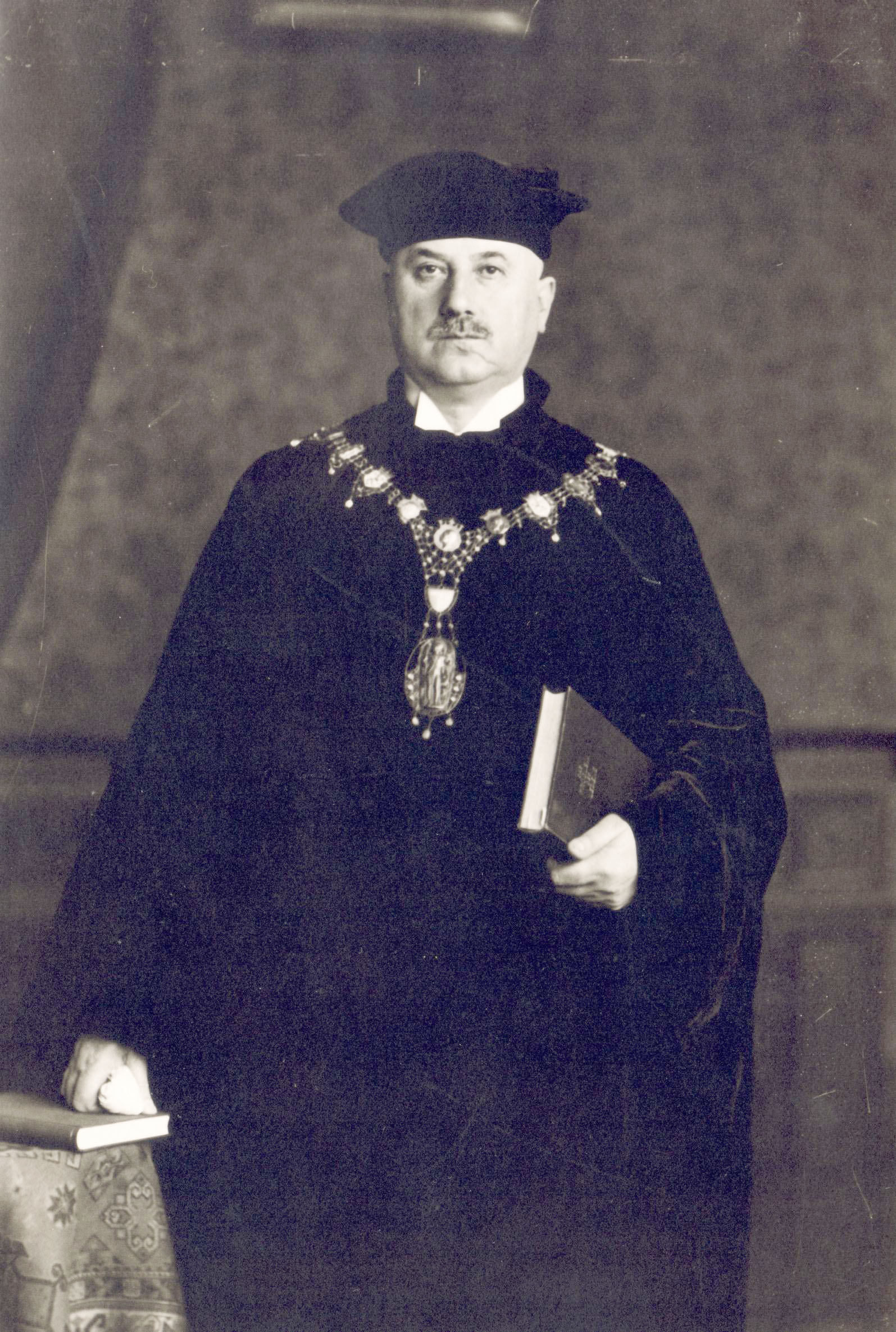 Fotografie von Karl Bürker im Ornat des Rektors der Hessischen Ludwis-Universität